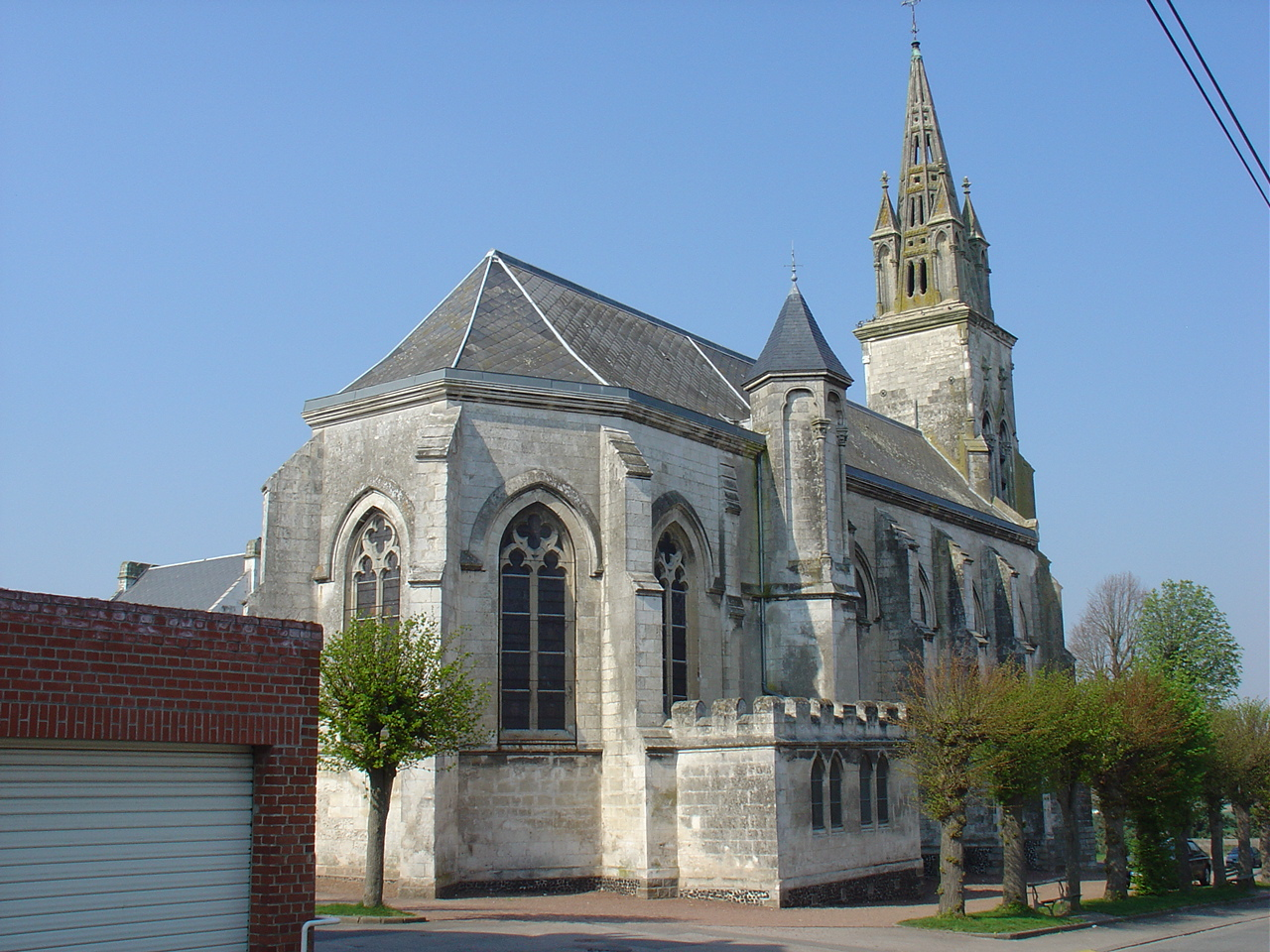 Église de Lozinghem